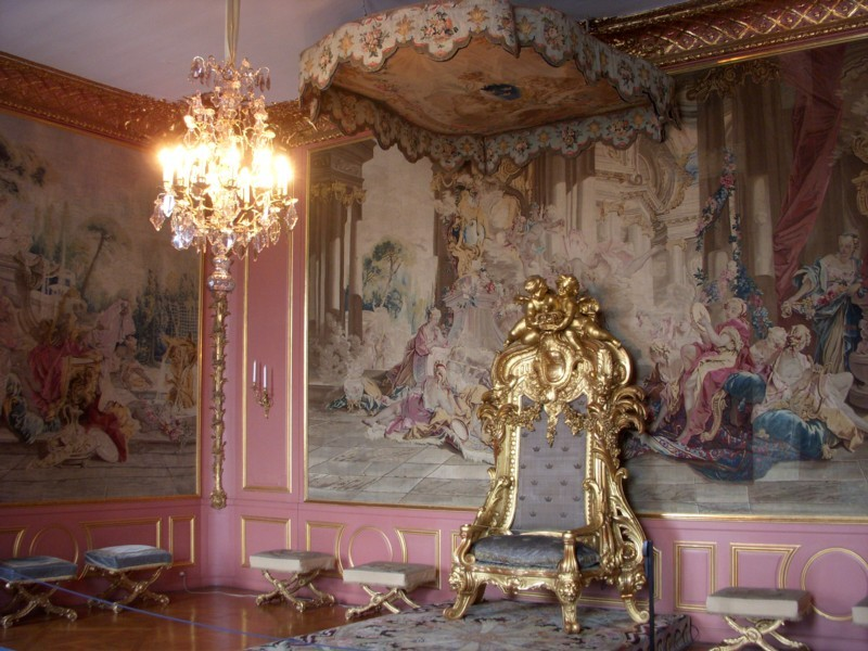 Lovisa Ulrikas audiensrum, Bernadottevåningen, Stockholms slott. Förlagorna till de vävda tapeterna med motiv från den antika sagan om Amor och Psyke är tecknade av François Boucher och tapeterna är vävda i Beauvais i Frankrike.